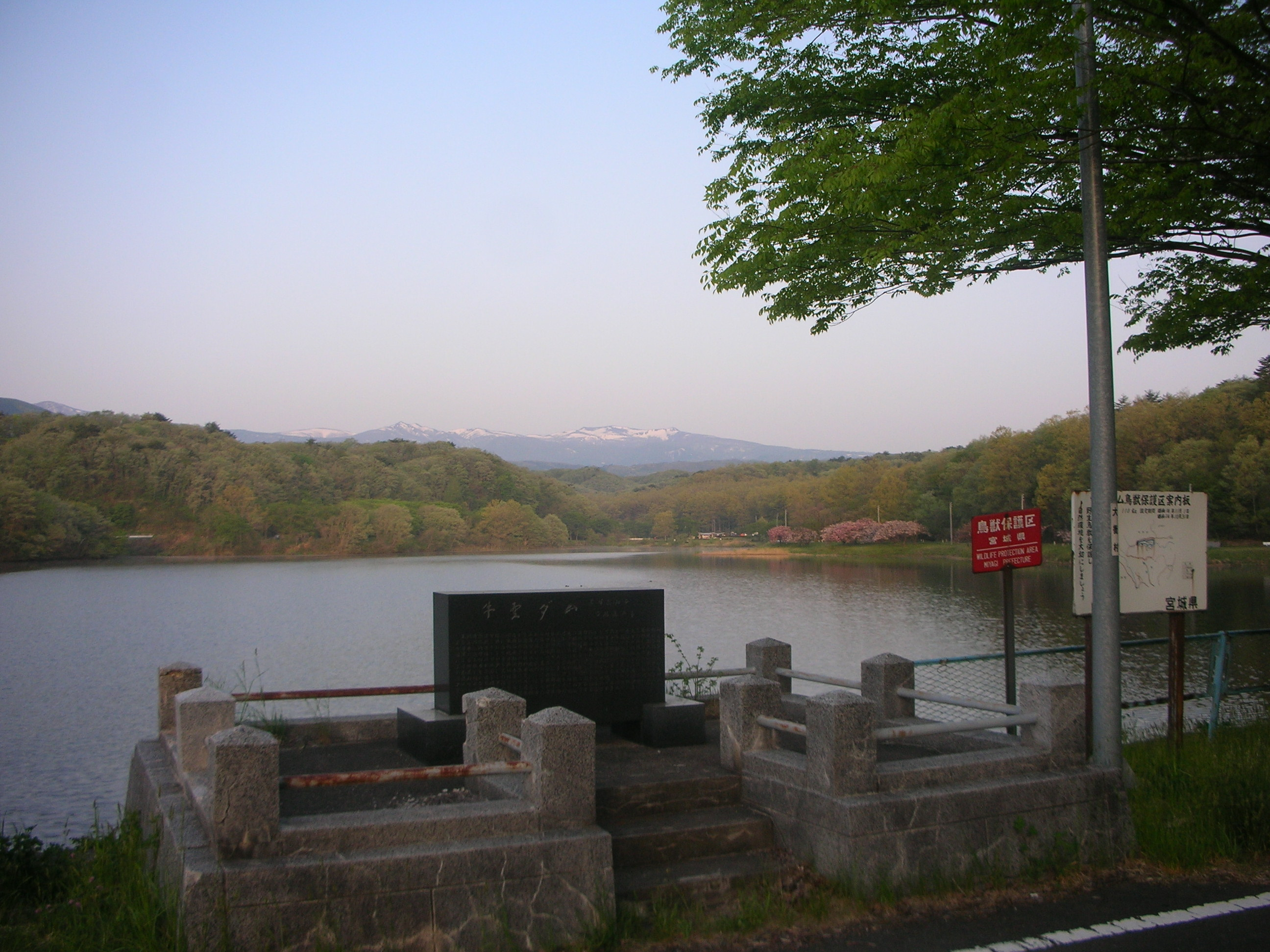 達居森と湖畔自然公園